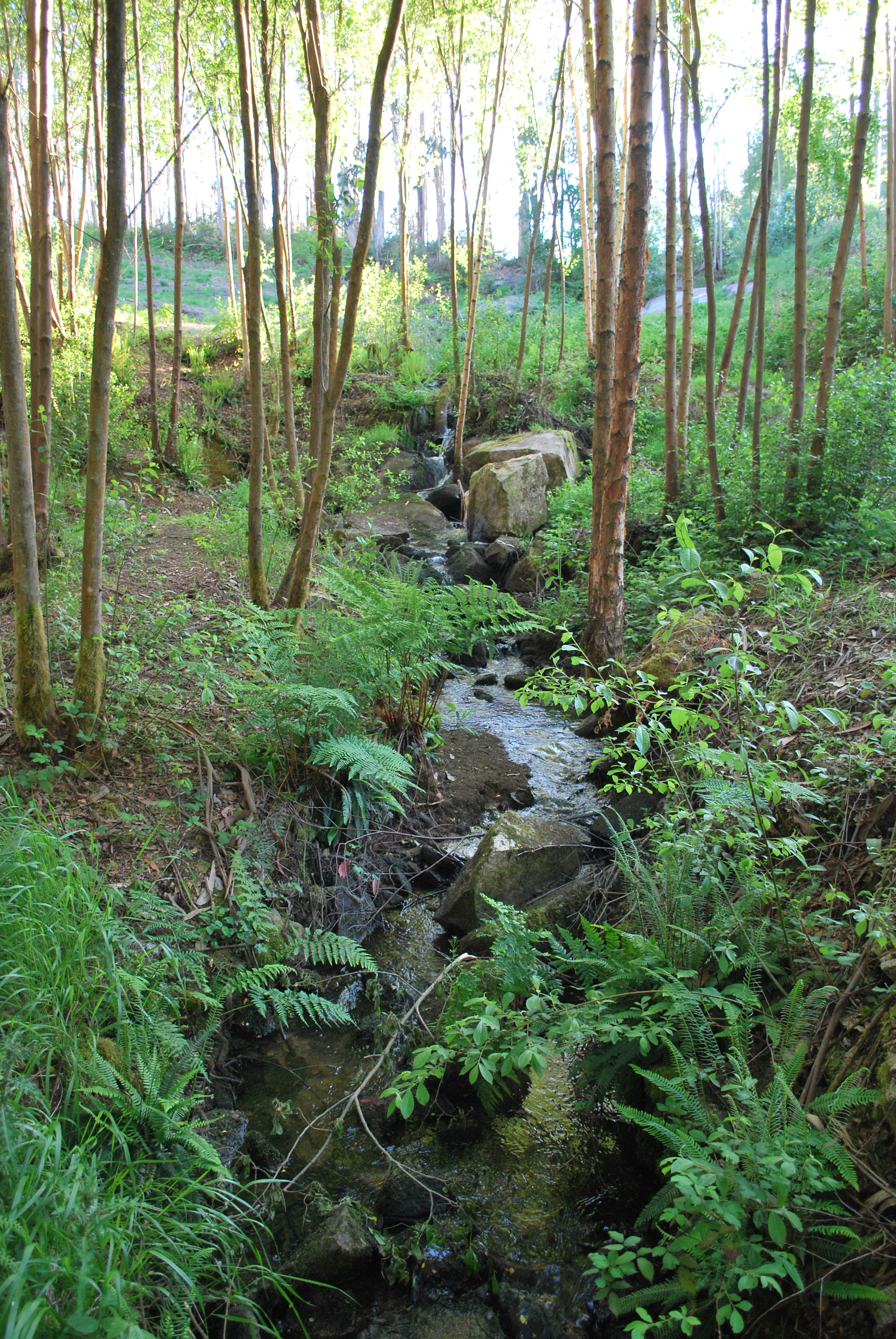 Rego de Trabe na Zapateira, preto do nacemento Culleredo A Coruña Galiza Spain